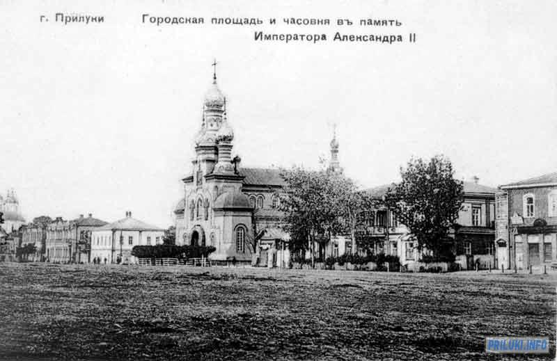 Базарна_площа_Прилук.jpg: Базарна площа (сучасна Центральна) у Прилуках на фото початку ХХ століття